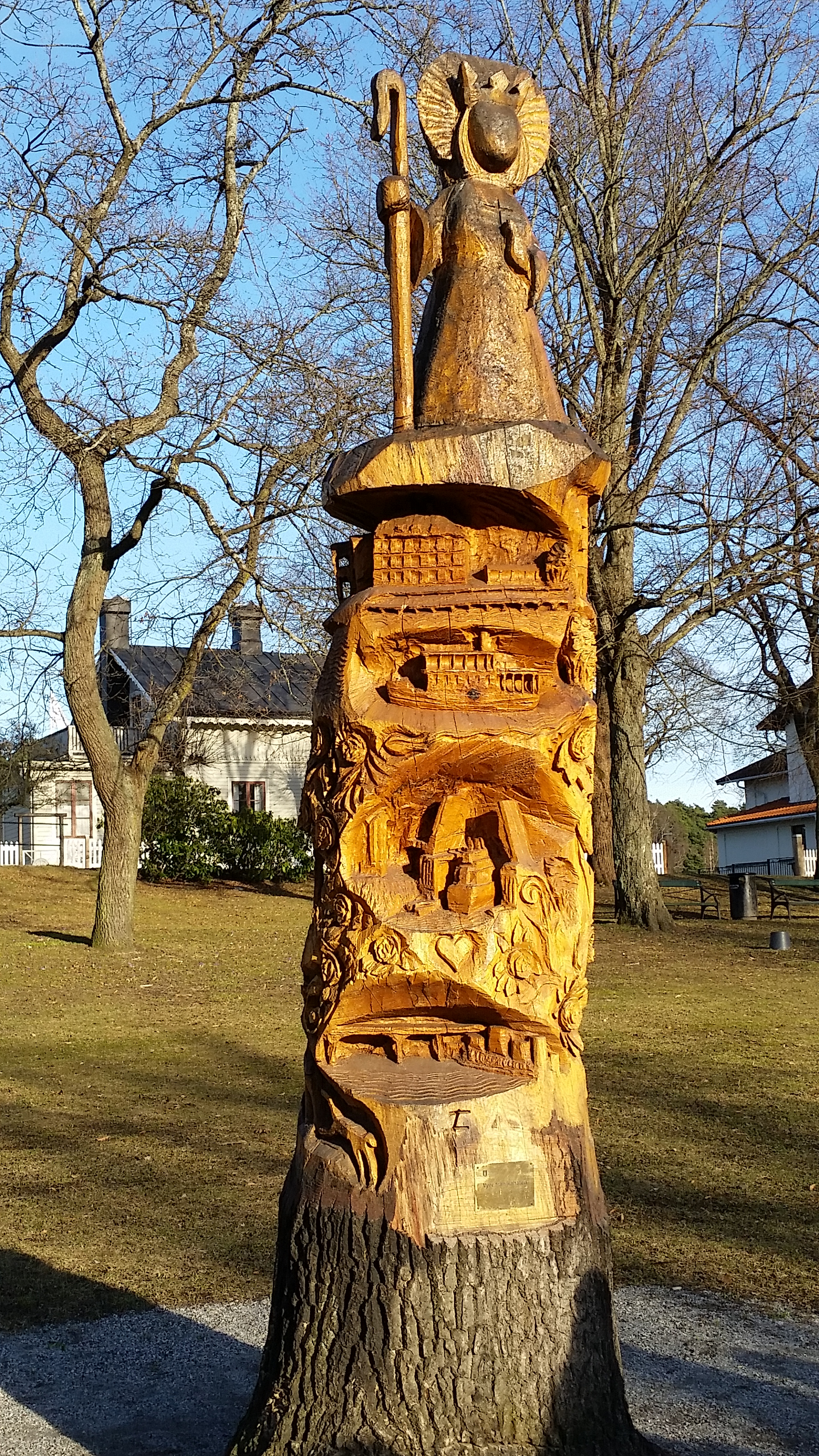 Vyer från kanalen (2013) - Torbjörn Lindgren, Södertälje This reproduction of an architectural work or work of art, is covered under the Swedish law of copyright for literary and artistic works (Law 1960:729, paragraph 24), which states that "Work of art may be depicted if it is permanently placed on or at a public place outdoors. Buildings may be freely depicted." See Commons:Freedom of panorama#Sweden for more information.